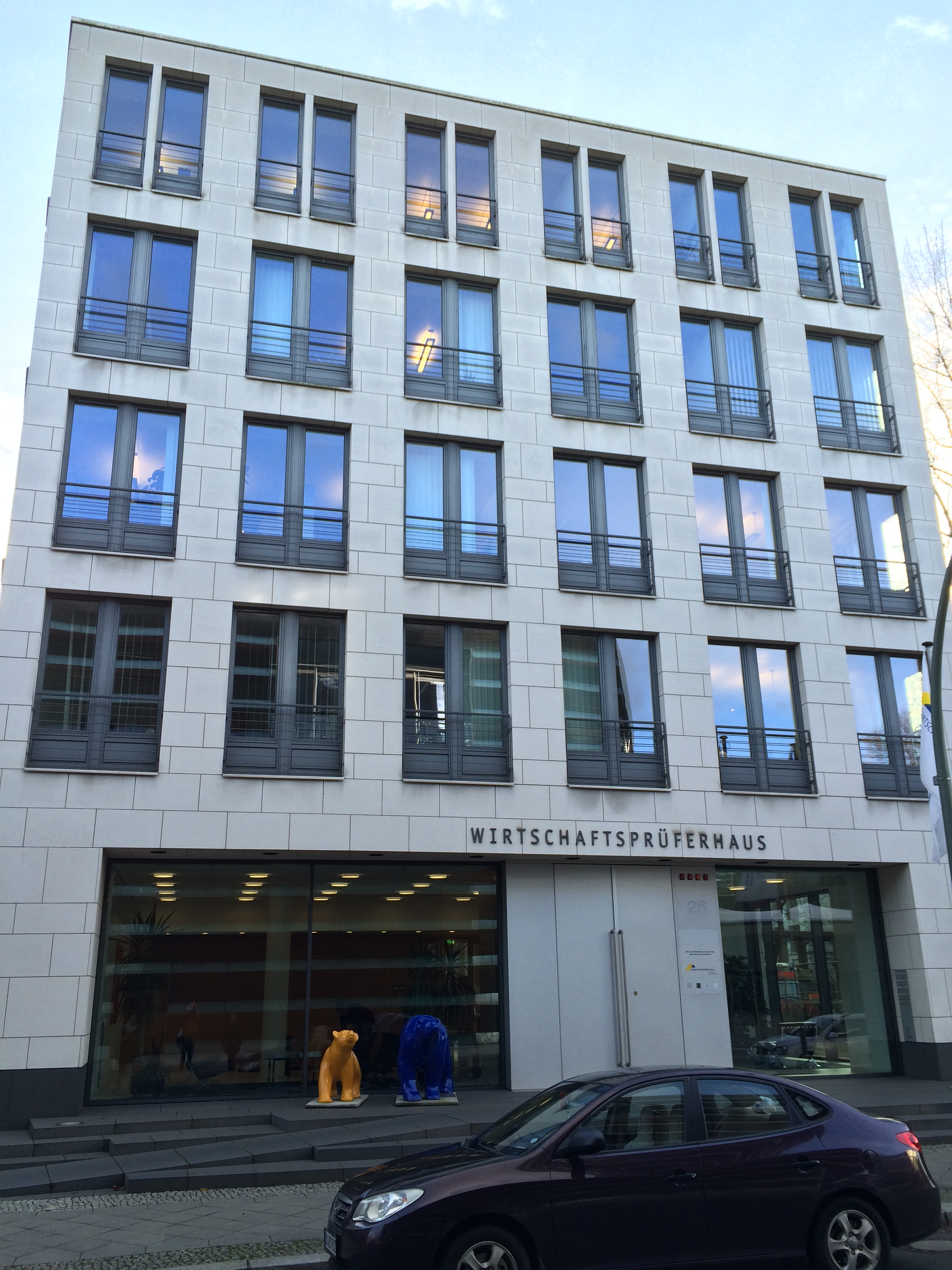 Gebäude der Wirtschaftsprüferkammer in Berlin-Tiergarten, Rauchstraße